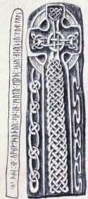 image